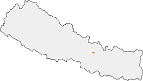 Położenie Parku Narodowego Shivapuri (Shivapuri National Park)